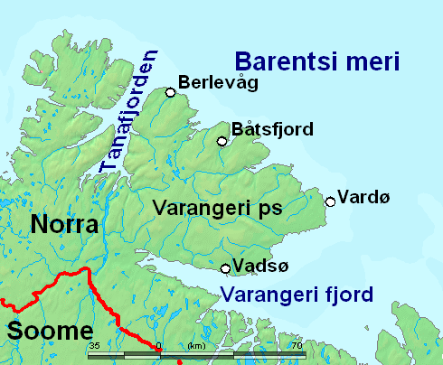 Varangeri poolsaare kaart, kaardi alusel